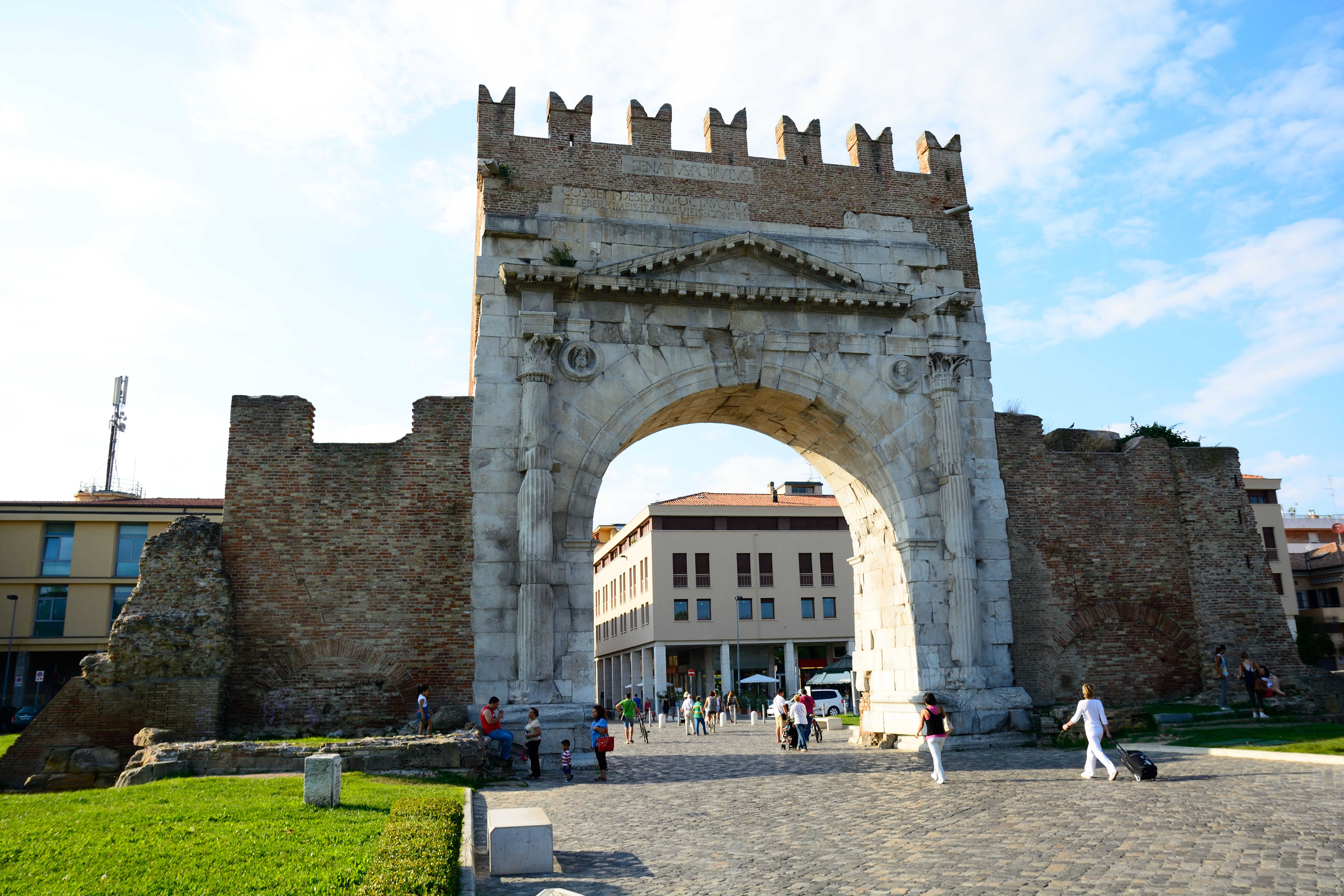 Arco di Augusto - MIBAC This is a photo of a monument which is part of cultural heritage of Italy.